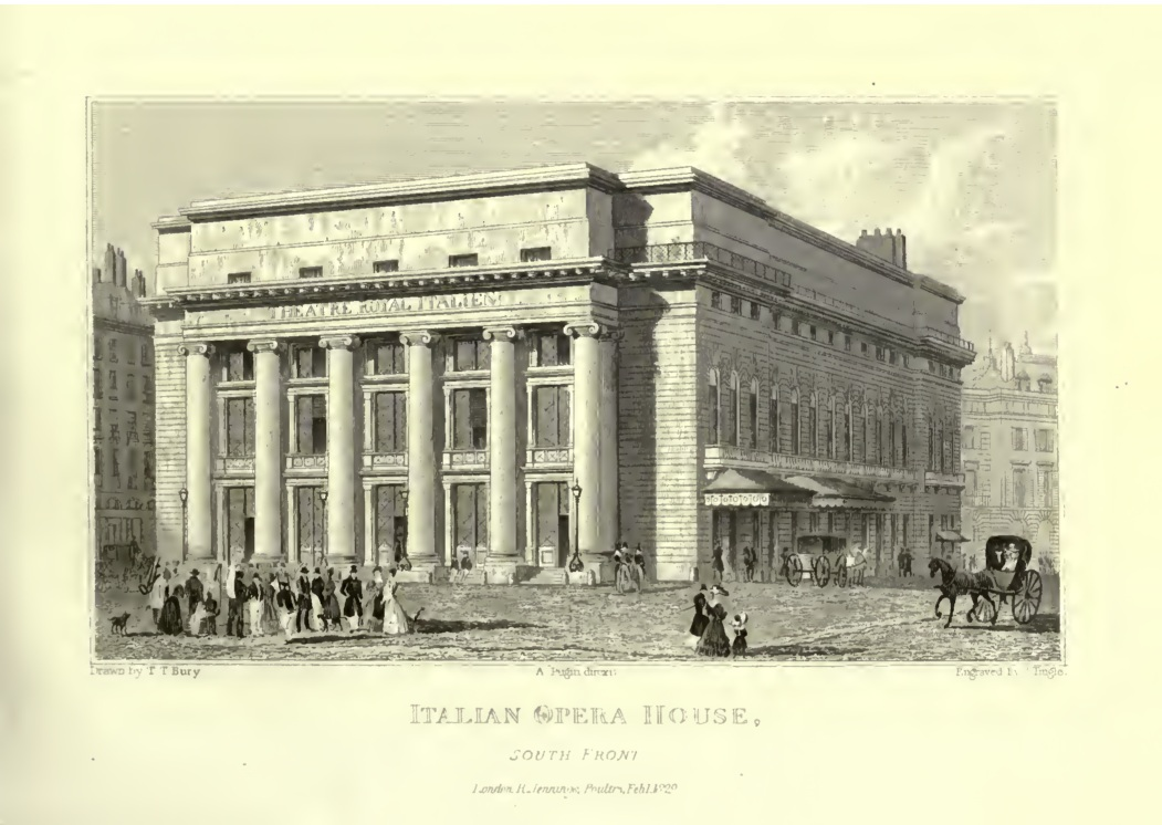 Première salle Favart, bâtiment édifié d'après les plans de Jean-François Heurtier en 1783 et détruit par un incendie en 1838